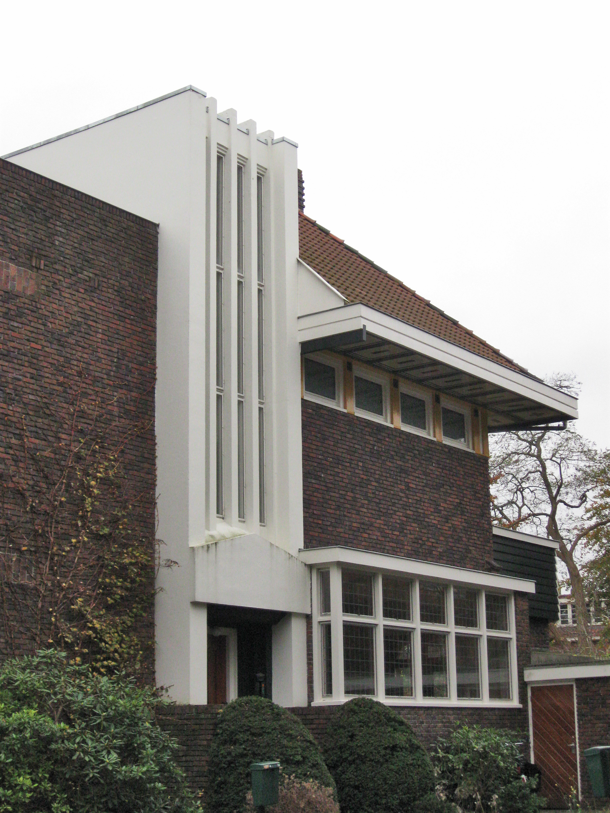 Groningen, Oranjesingel 13-14, Dubbele villa in amsterdamseschoolstijl, arch. M B Bruins, 1926; rm 484062